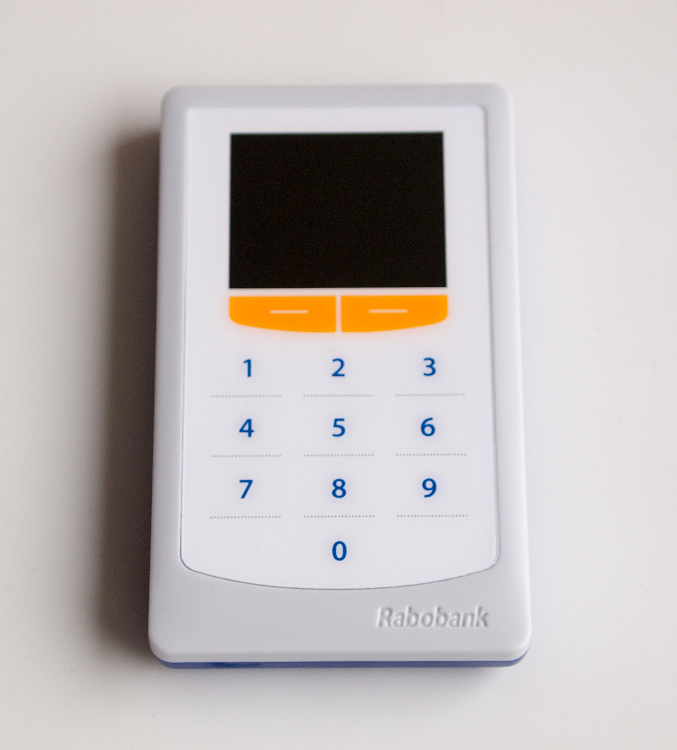 Detailfoto van de voorzijde Rabo Scanner, voorzien van het display en de toetsen.